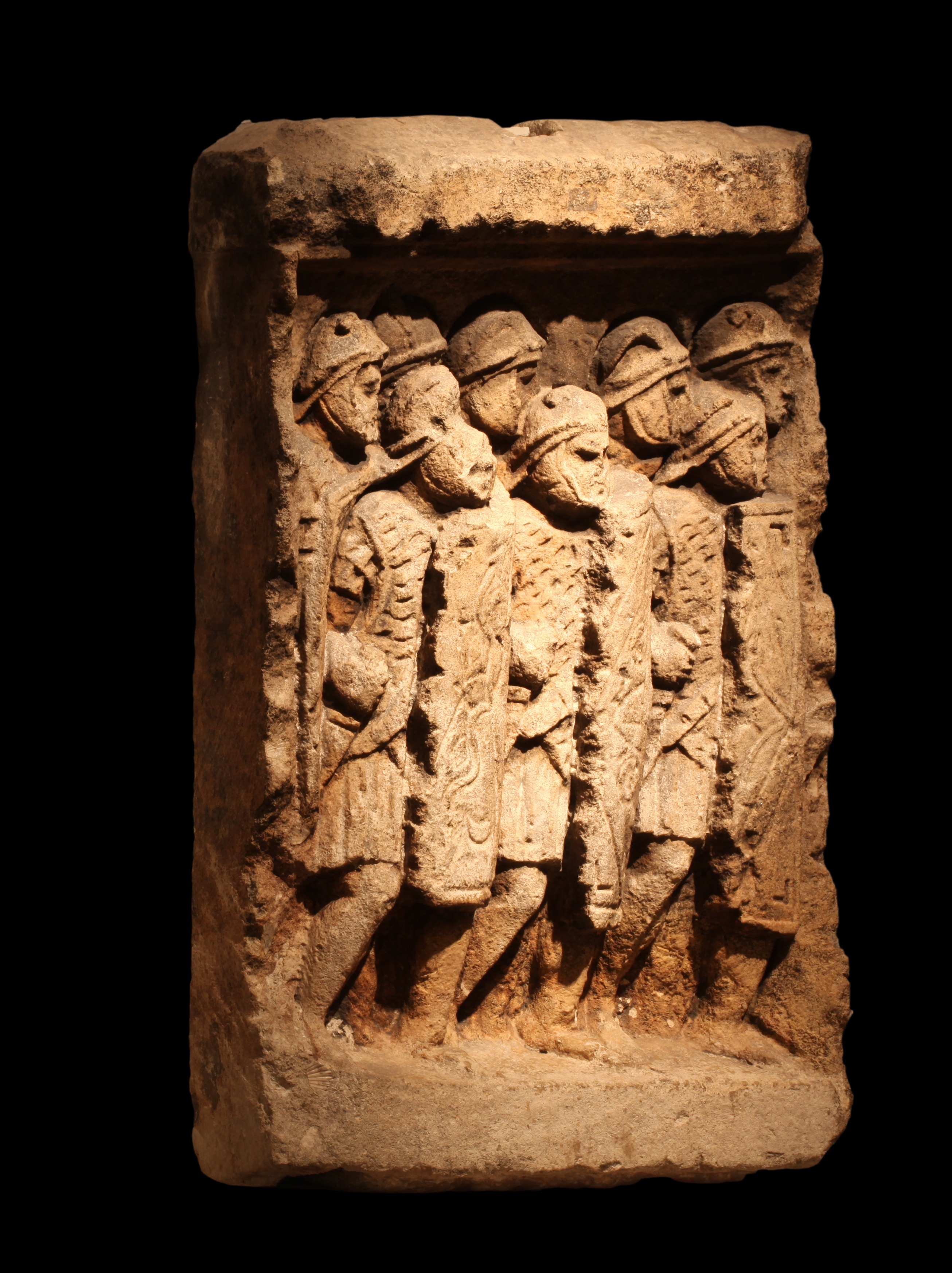 Roman legionaries. Bas-relief from Glanum (Saint-Rémy-de-Provence). Espérandieu 130. On display at Fourvière Gallo-Roman museum, Lyon.